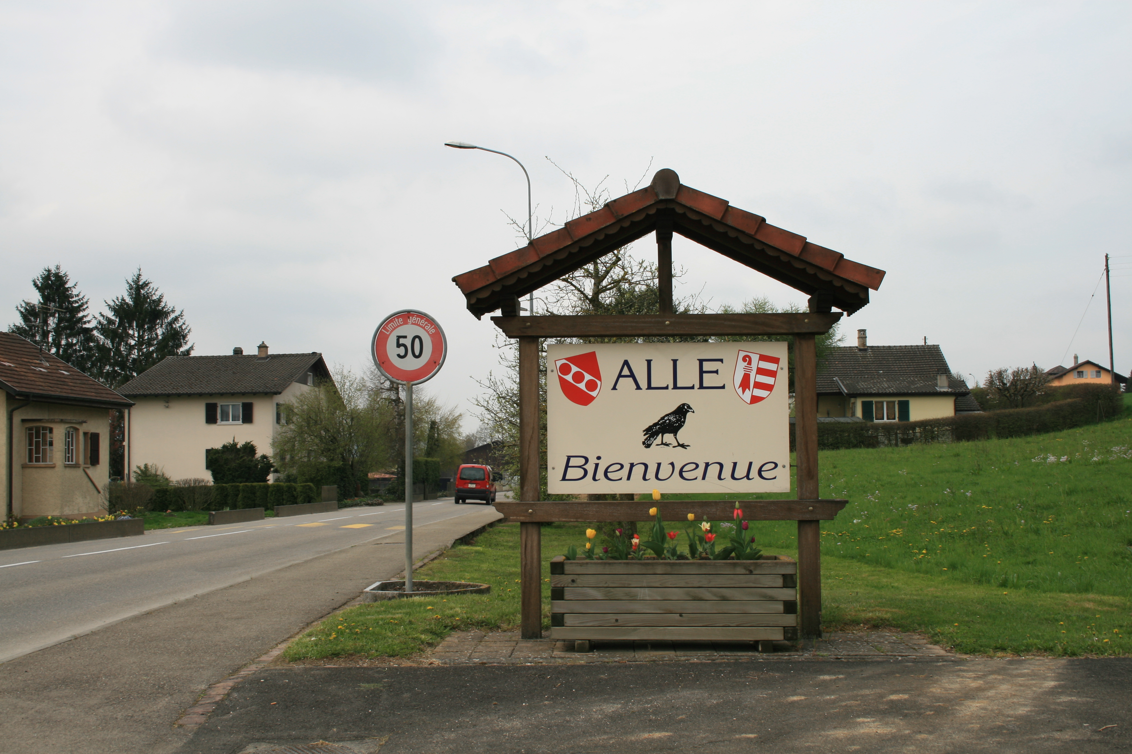 Ortseingang von Alle JU, Schweiz